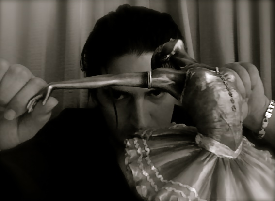 Escultor Roberto Ledesma